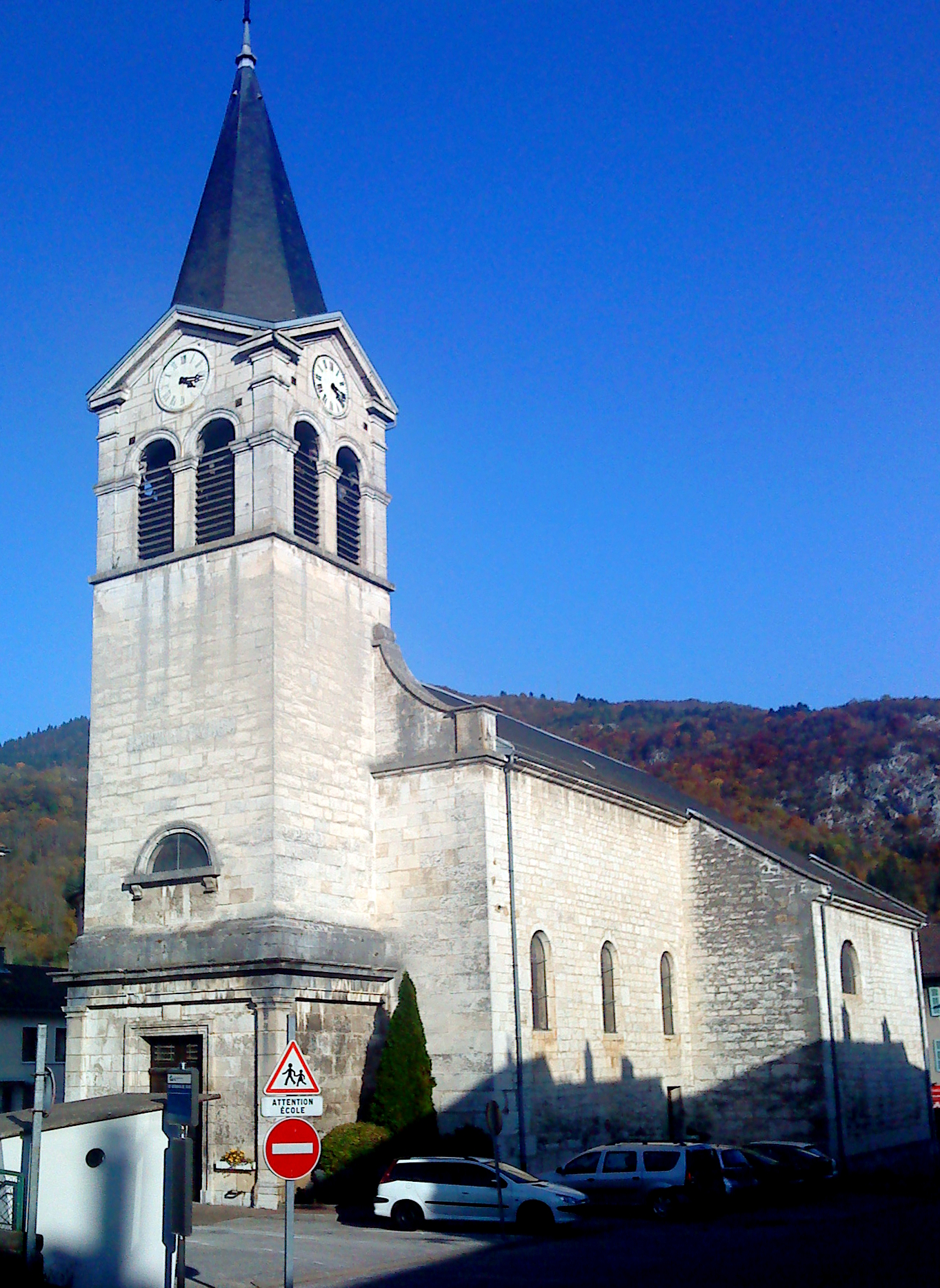 Église de Saint-Germain-de-Joux, Ain, France